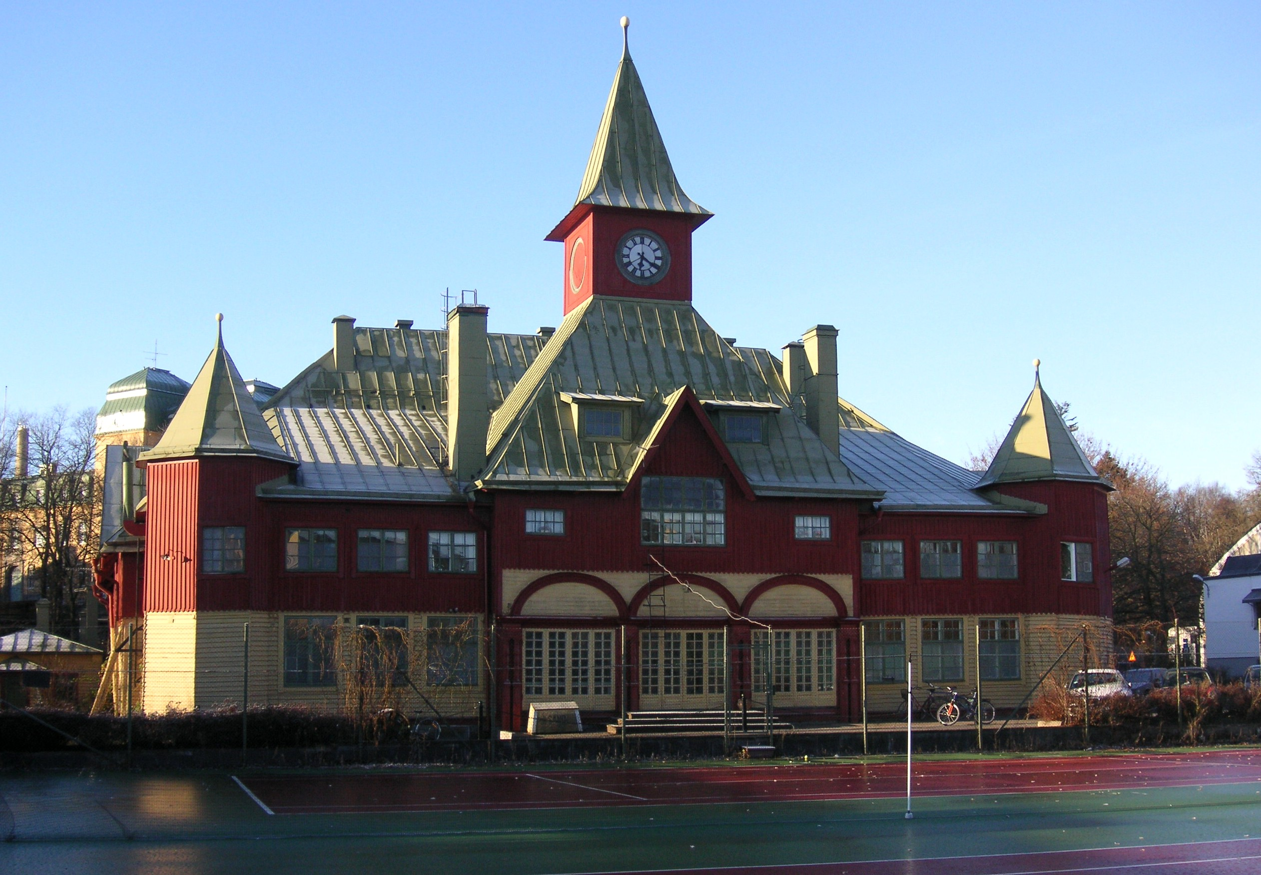 Liljekvist tennispaviljong på Djurgården